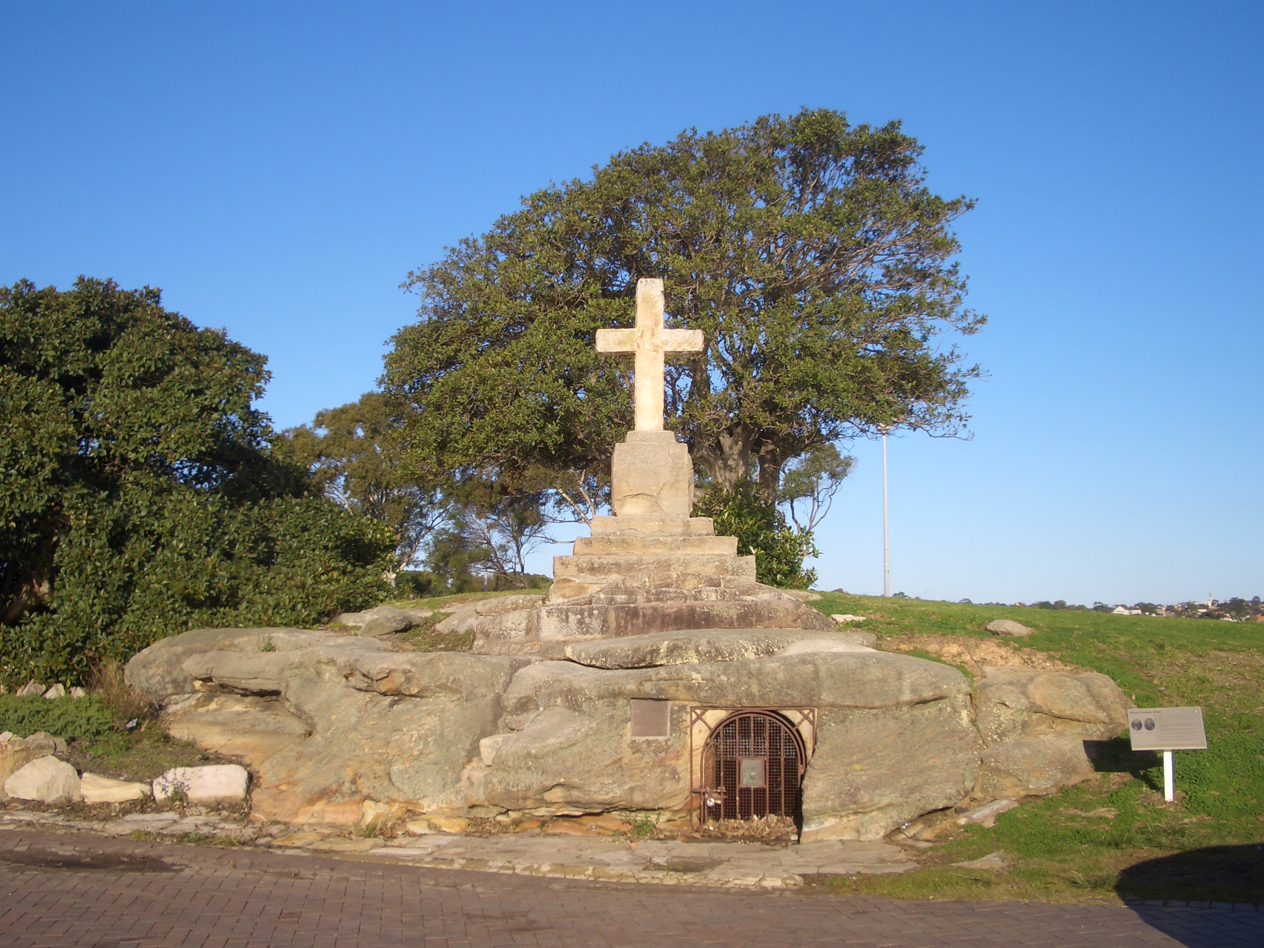 Rodd Point, Sydney